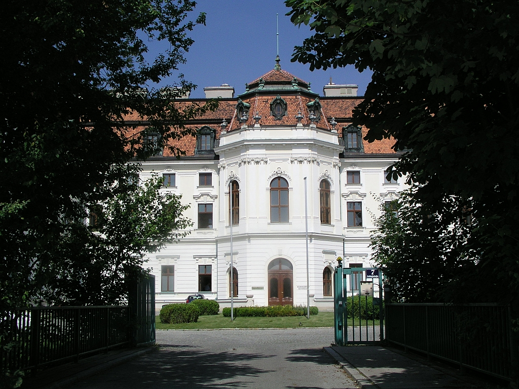 Frontansicht von Schloss Altkettenhof